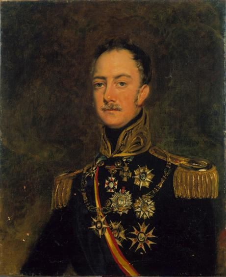 Retrato do Duque da Terceira